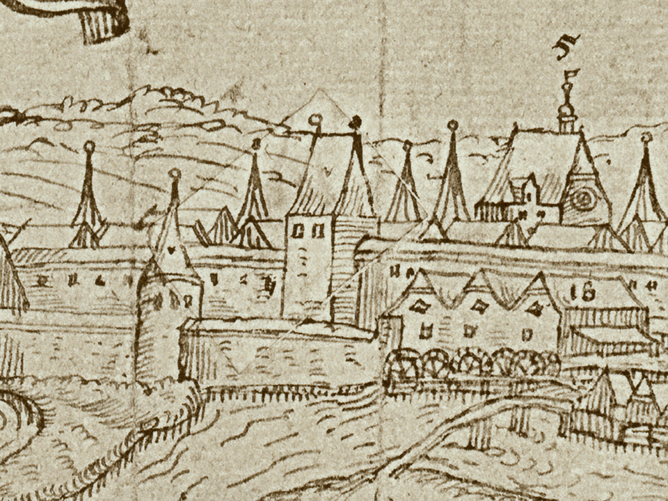 Věž Lauseck na Willenbergově vedutě Českých Budějovic, 1602